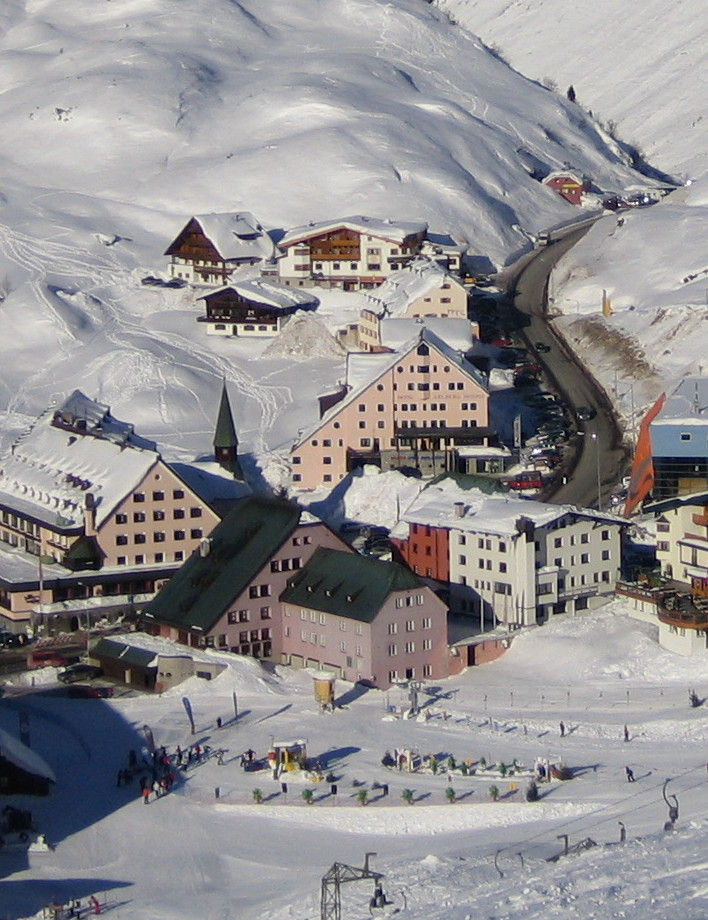 St. Christoph am Arlberg in Austria.